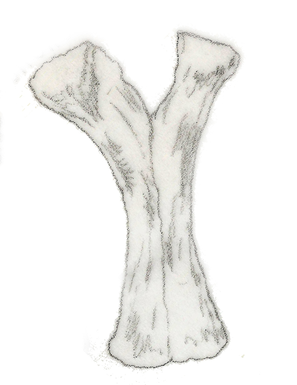 Illustration of a fossil of Euskelosaurus